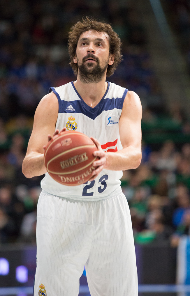 Sergio Llull con la camiseta del Real Madrid en un partido en el Olímpico de Badalona durante la temporada 2016-17.